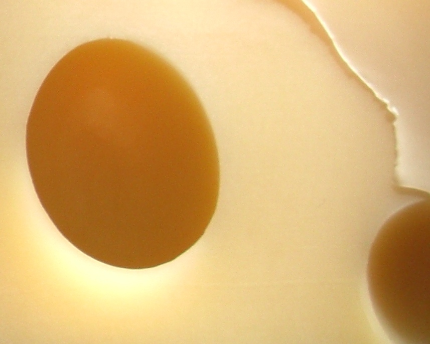 2 holes in Emmental cheese.